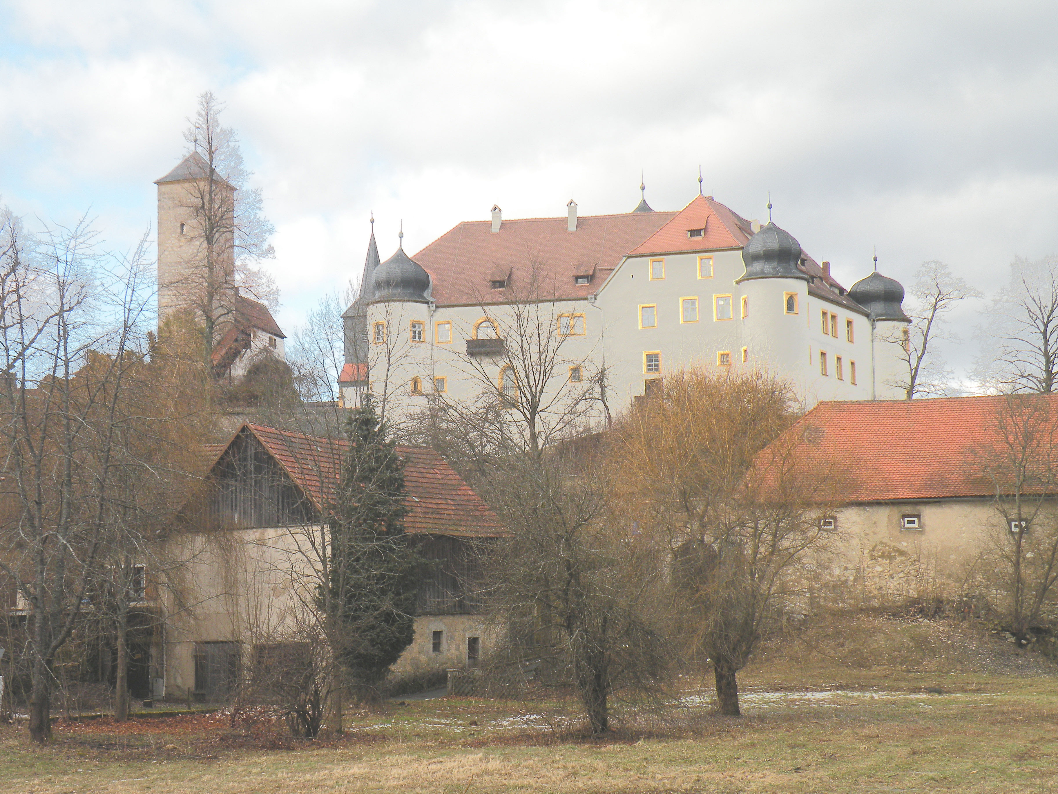 Франконская Швейцария.Замок Унтерауфзес